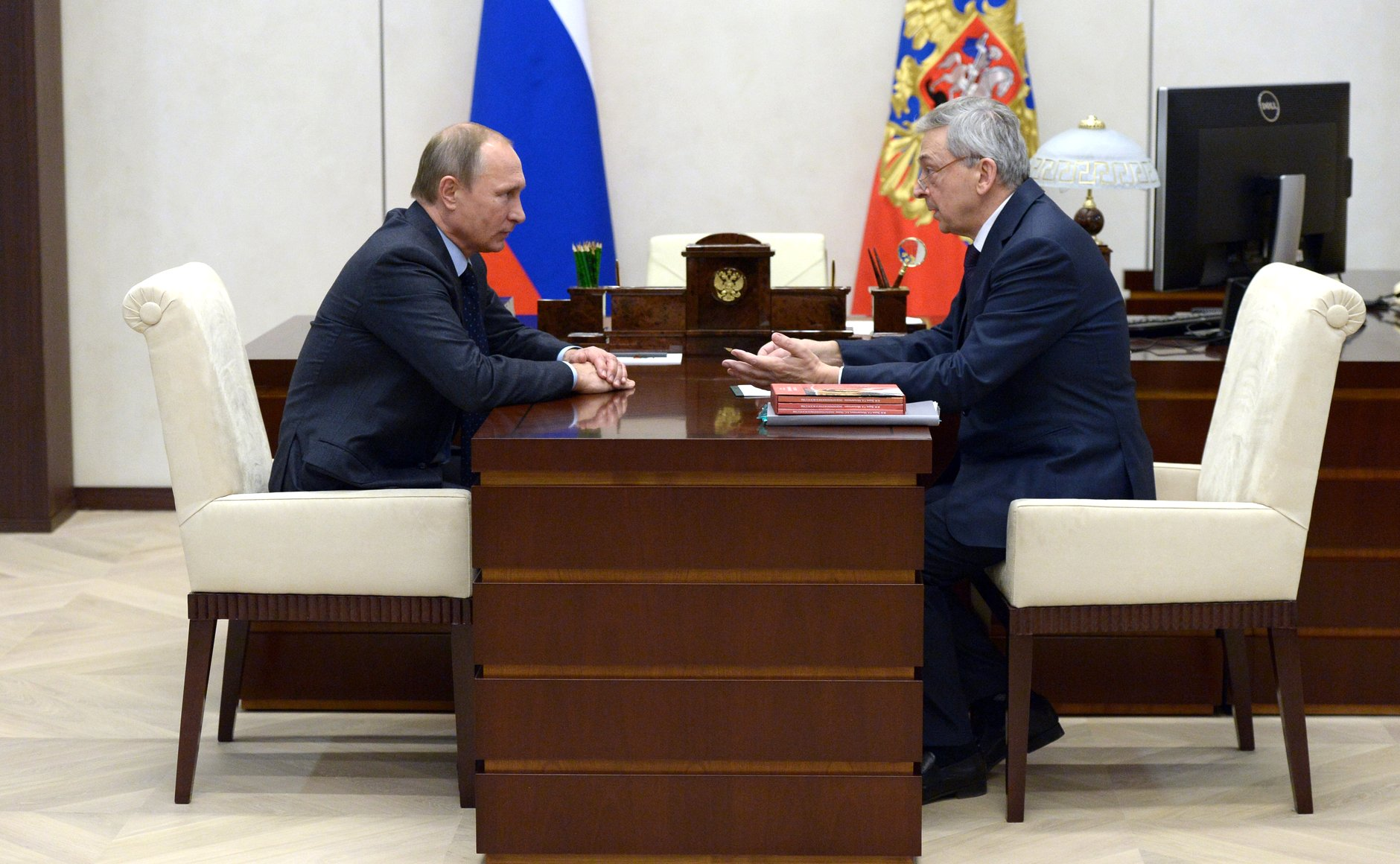 Встреча президента России Владимира Путина с вице-президентом Российской академии наук, главным эндокринологом Министерства здравоохранения, заслуженным деятелем науки Иваном Дедовым